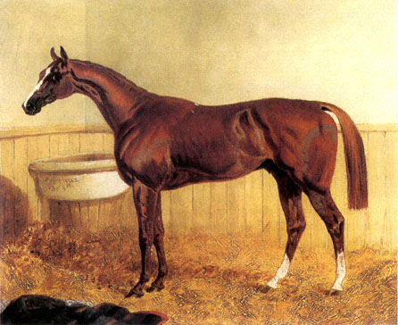 Rennpferd Pyrrhus the First